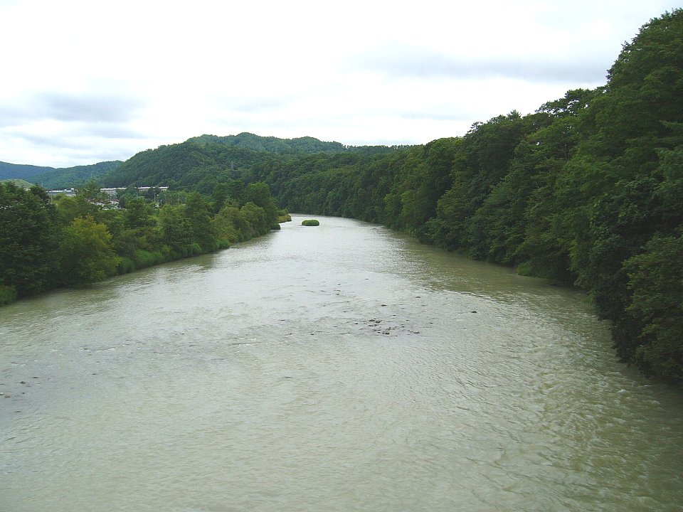 夕張川 石勝線 沼ノ沢～南清水沢間の車窓から 2006年8月10日 Bakkai撮影